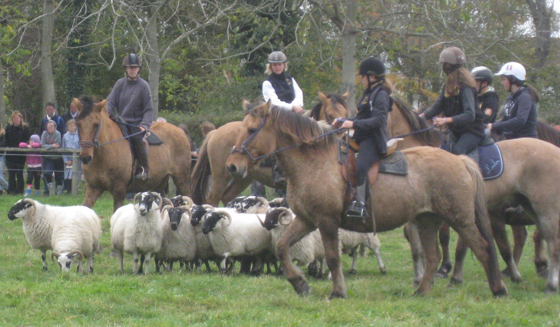 Démonstration lors du Trans'Henson 2014, Baie de Somme, France